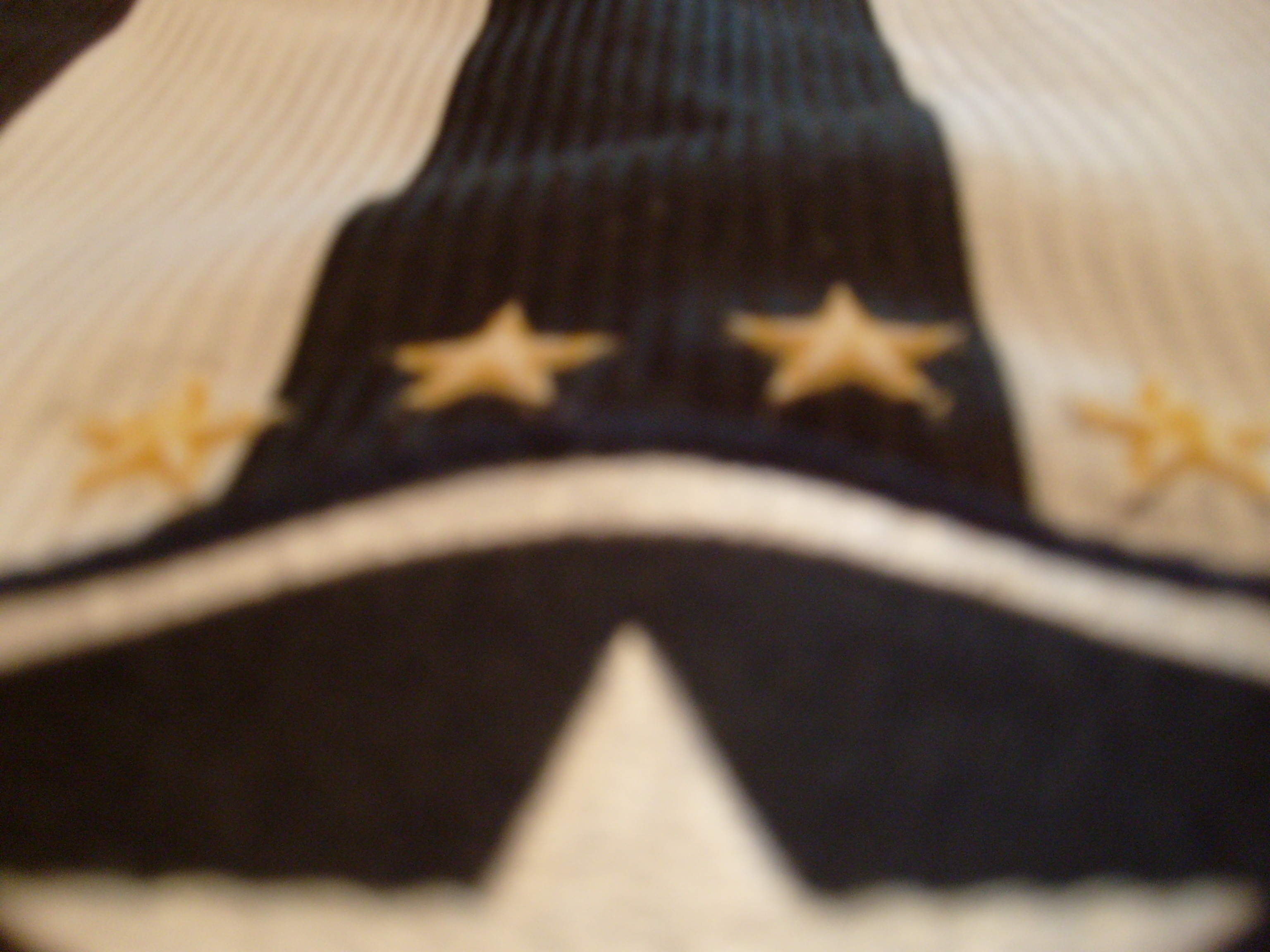 Estrelas da camisa do Botafogo de Futebol e Regatas de 1999.